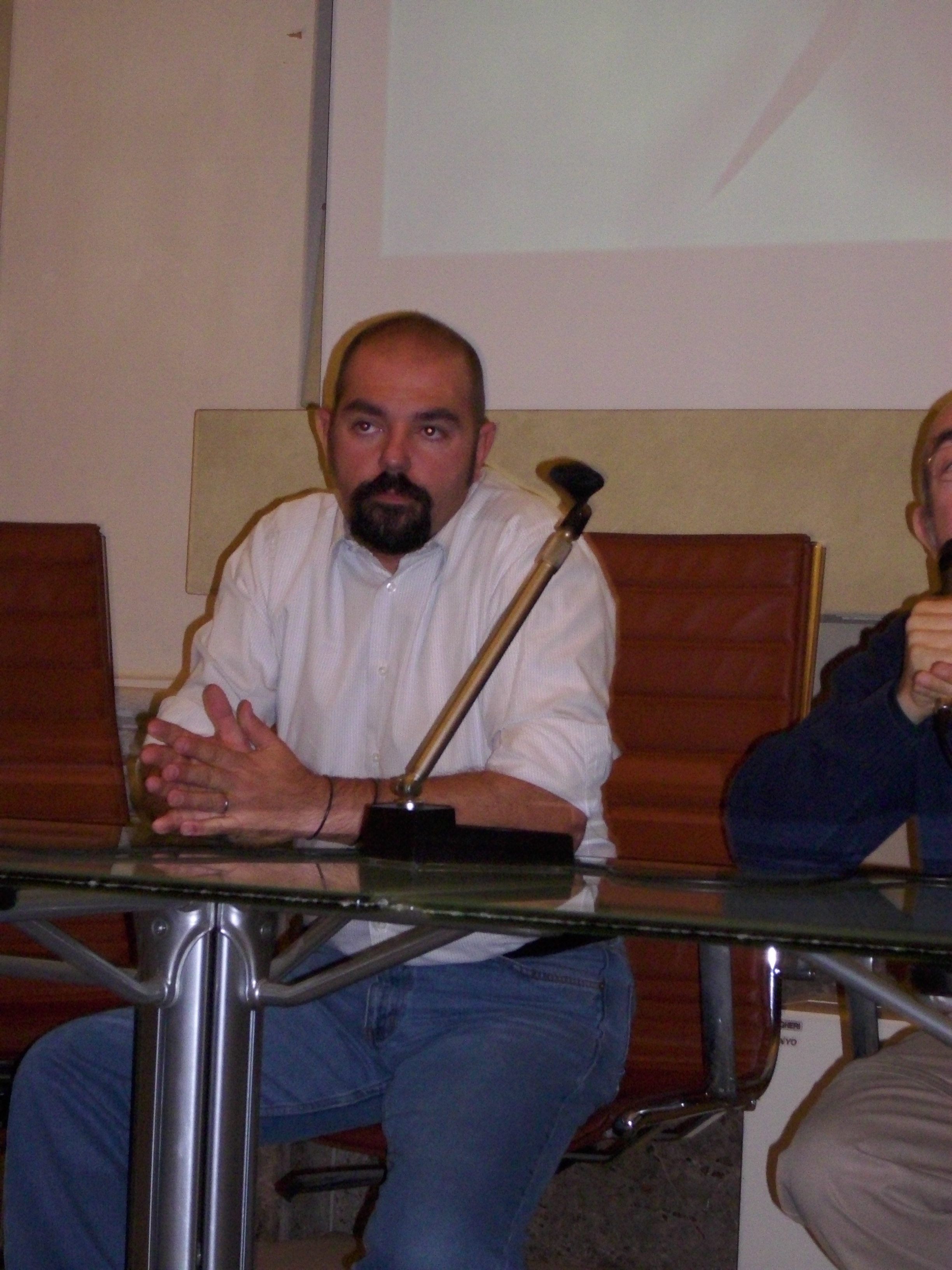 Presentazione del fumetto Greystorm della Sergio Bonelli editore a Lucca Comics 2009. Nella foto l'autore delle copertine e dell'impostazione grafica del fumetto, Gianmauro Cozzi.